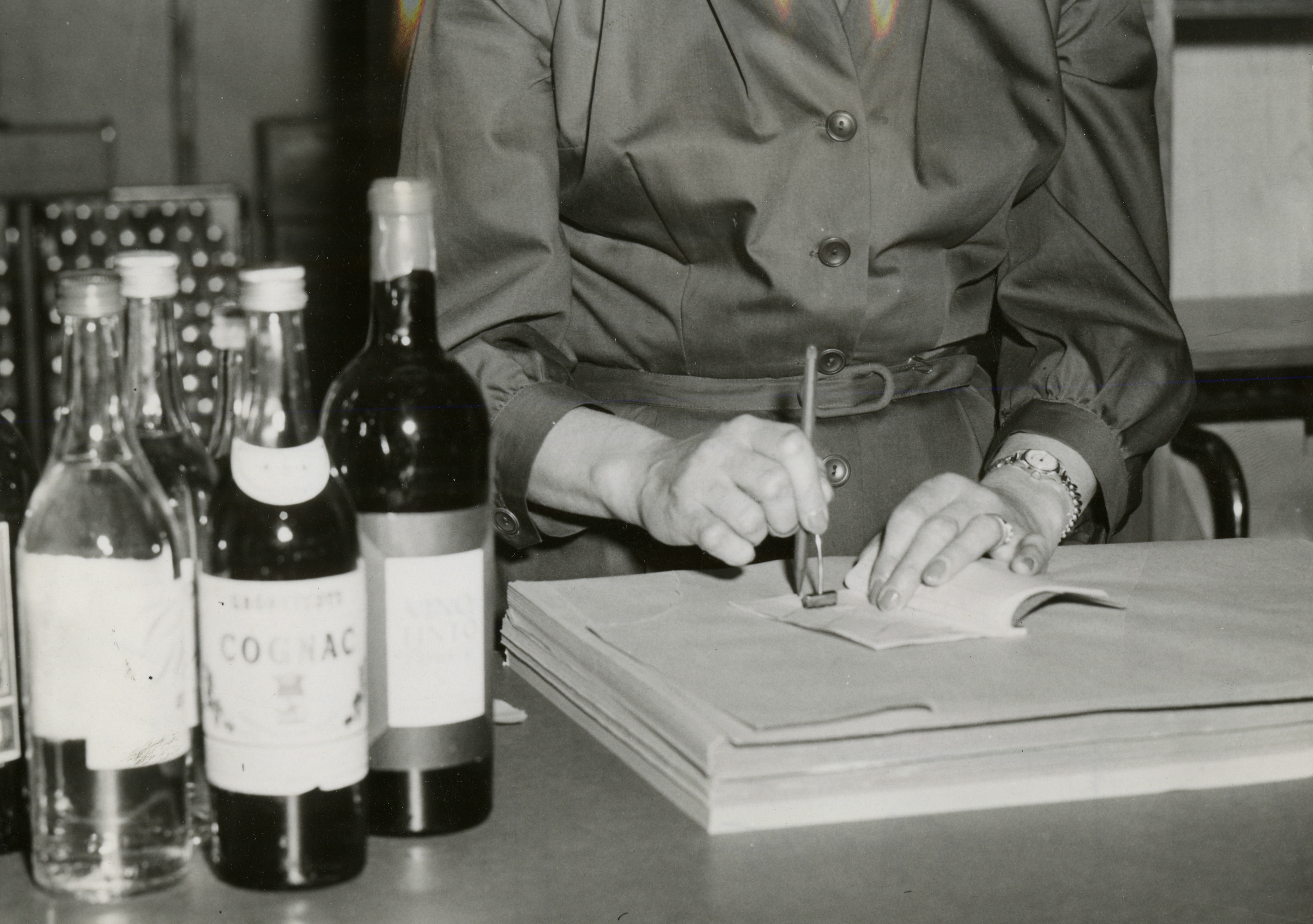 "Motboken är nu ett minne blott och massor av kunder skyndade till systemet sista dan för att få den historiska stämpeln. Det blir något att visa för barn och barnbarn när den svenska myndighetsdagen kommer på tal."